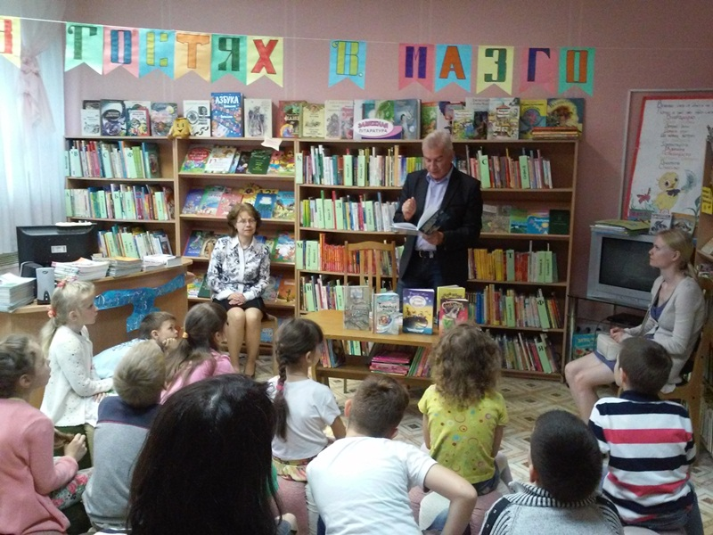 У.М. Мазго ў дзіцячай бібліятэцы №12